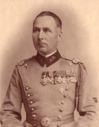 Генерал-лейтенант Леонард Мочульски (1889-1979) в звании майора после награждения Орденом Звезды Румынии в 1919 году